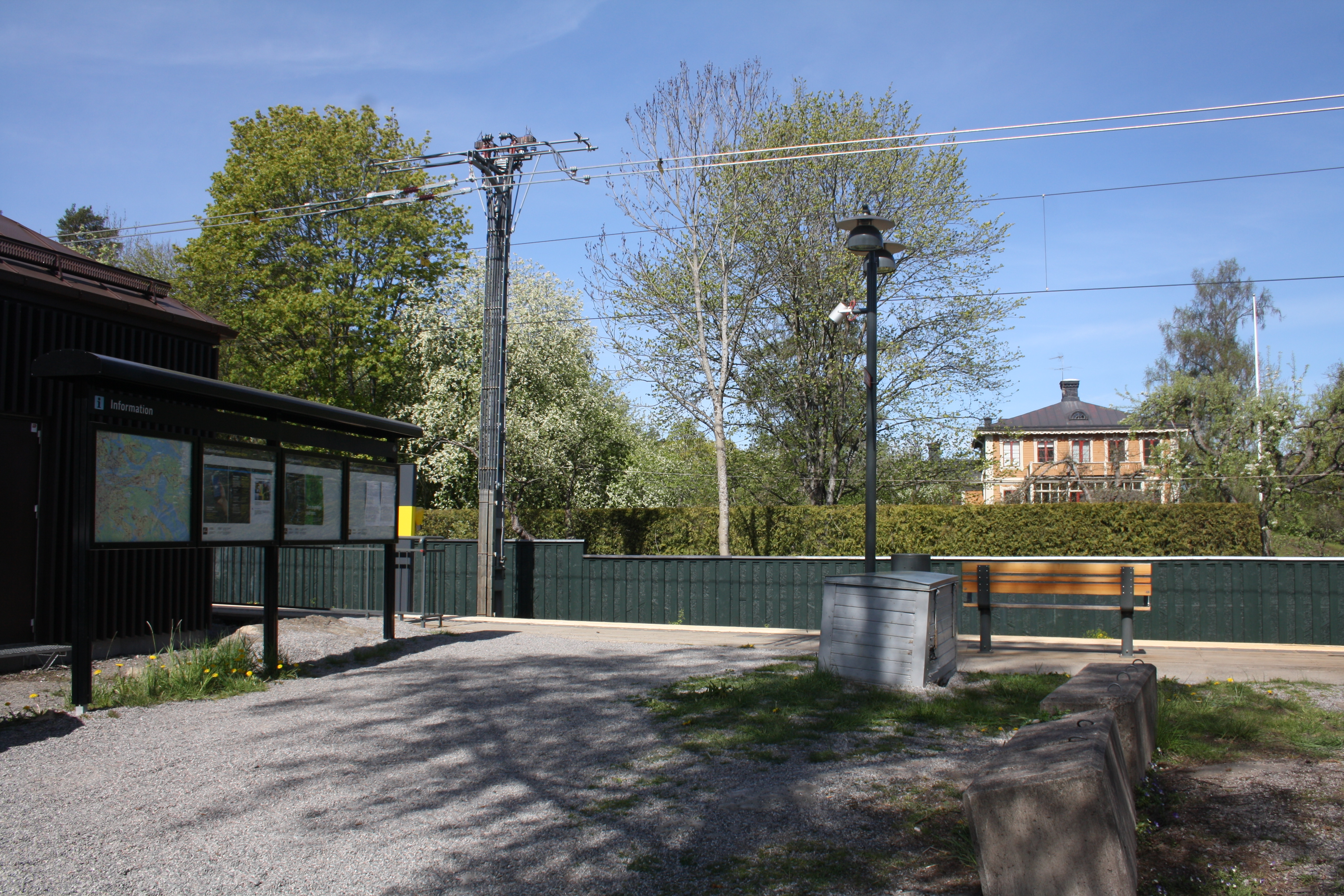 Östervik